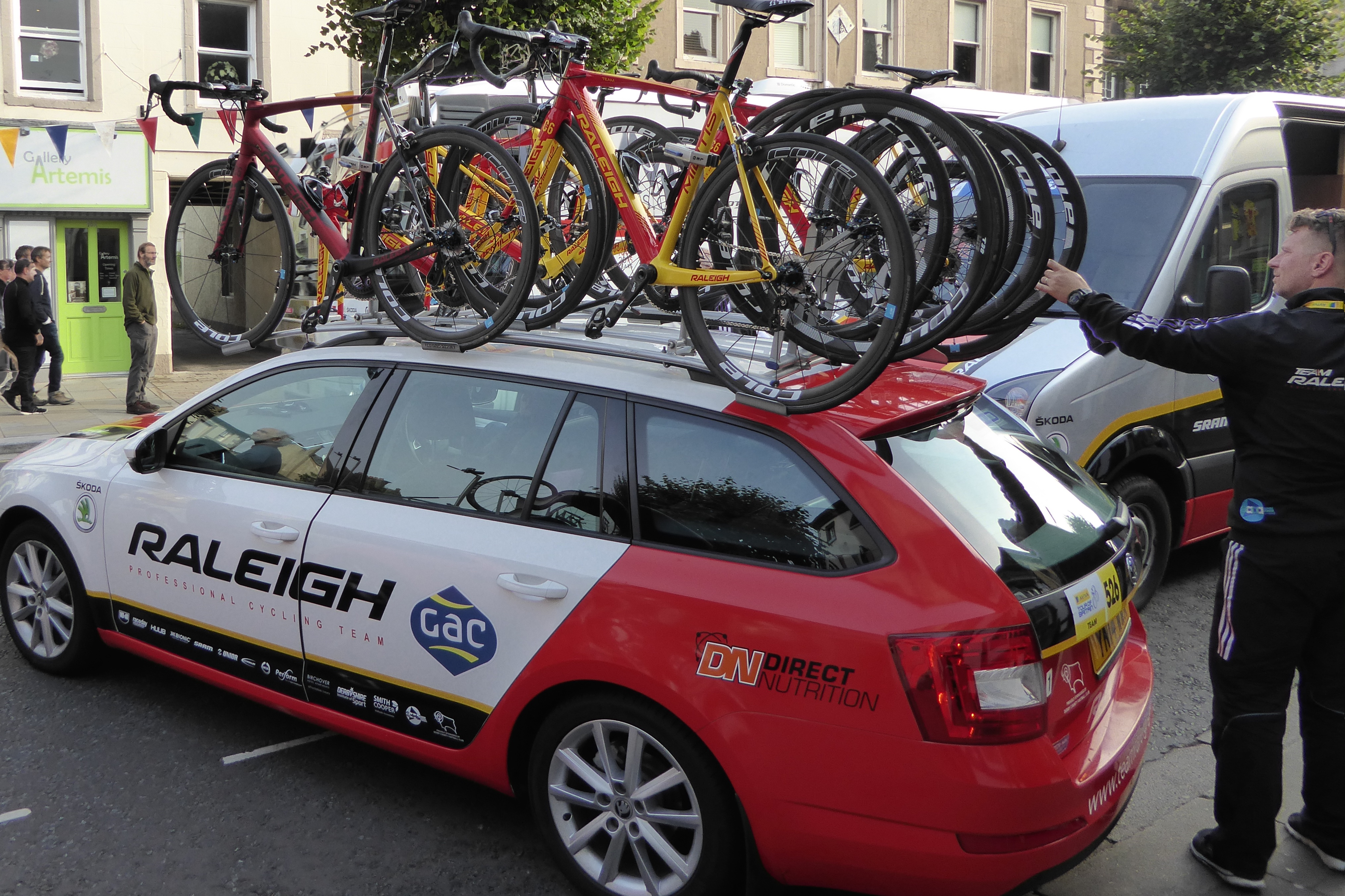 Raleigh Cycles